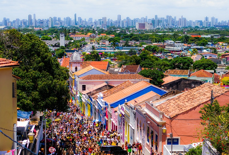 Carnaval Olinda 2017 - sábado (20)